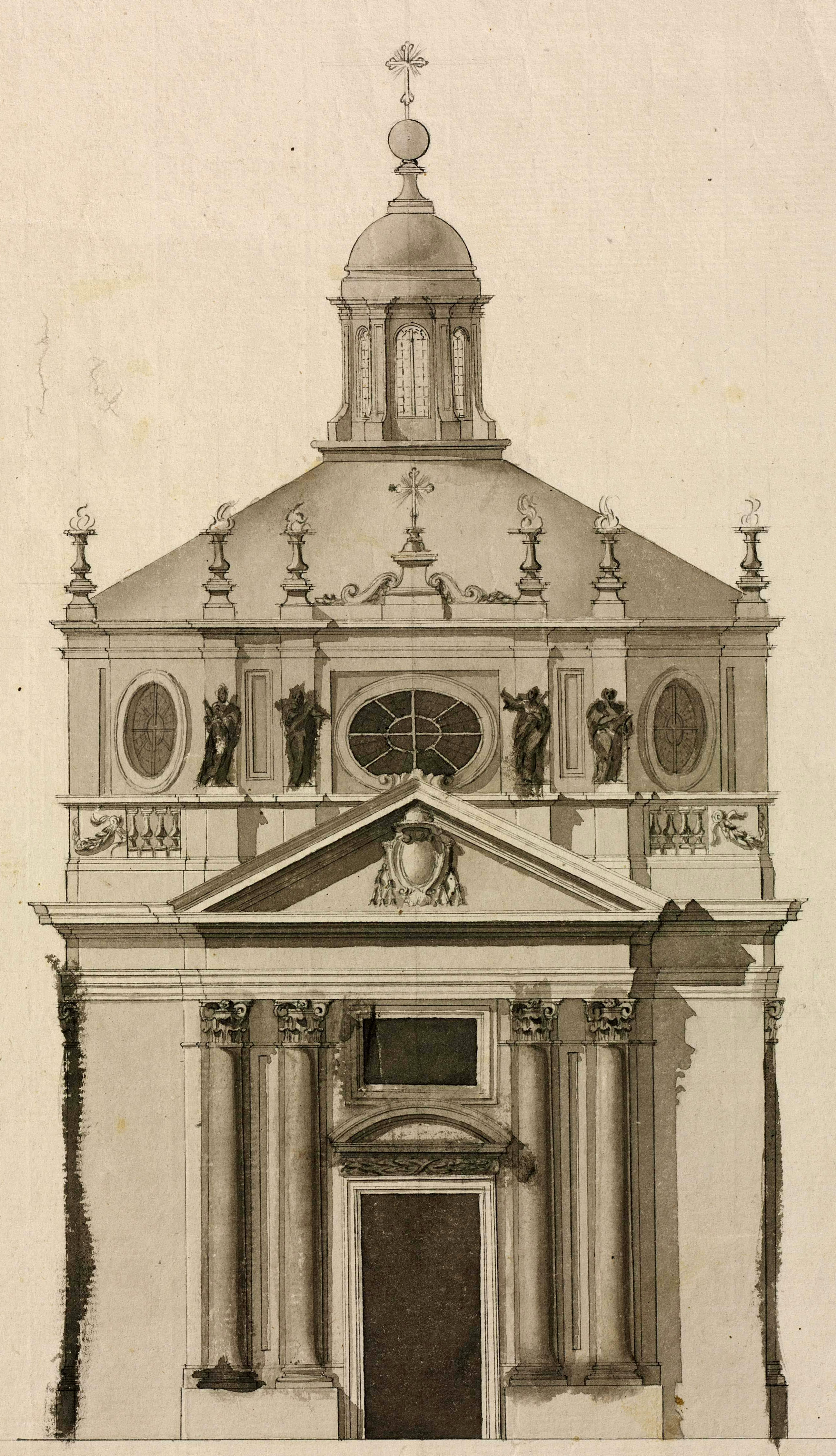 Fachada principal del Sagrario de la Catedral de Jaén (España), trazada por el arquitecto Ventura Rodriguez. Puerta flanqueada por dos pares de columnas corintias que sostienen un frontón triangular con el escudo cardenalicio; sobre el arquitrabe se alzan cuatro esculturas delante de los óculos del tambor de la cúpula que está rematada por una linterna.